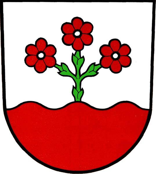 Znak obce Stará Červená Voda